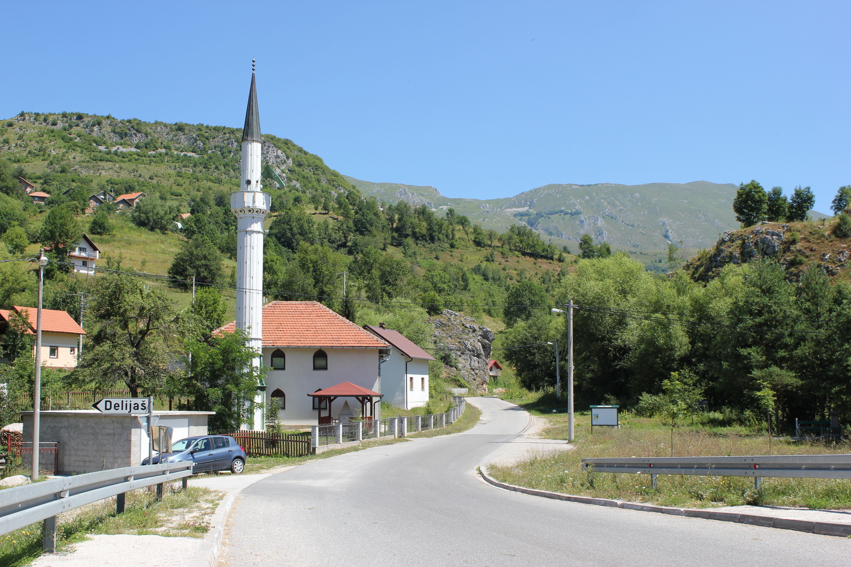 Das Dorf Delijaš an der Straße von Trnovo nach Ustikolina, Bosnien und Herzegowina.Hornjoserbsce: Wjeska Delijaš při dróze wot Trnova do Ustikoliny, Bosniska a Hercegowina.